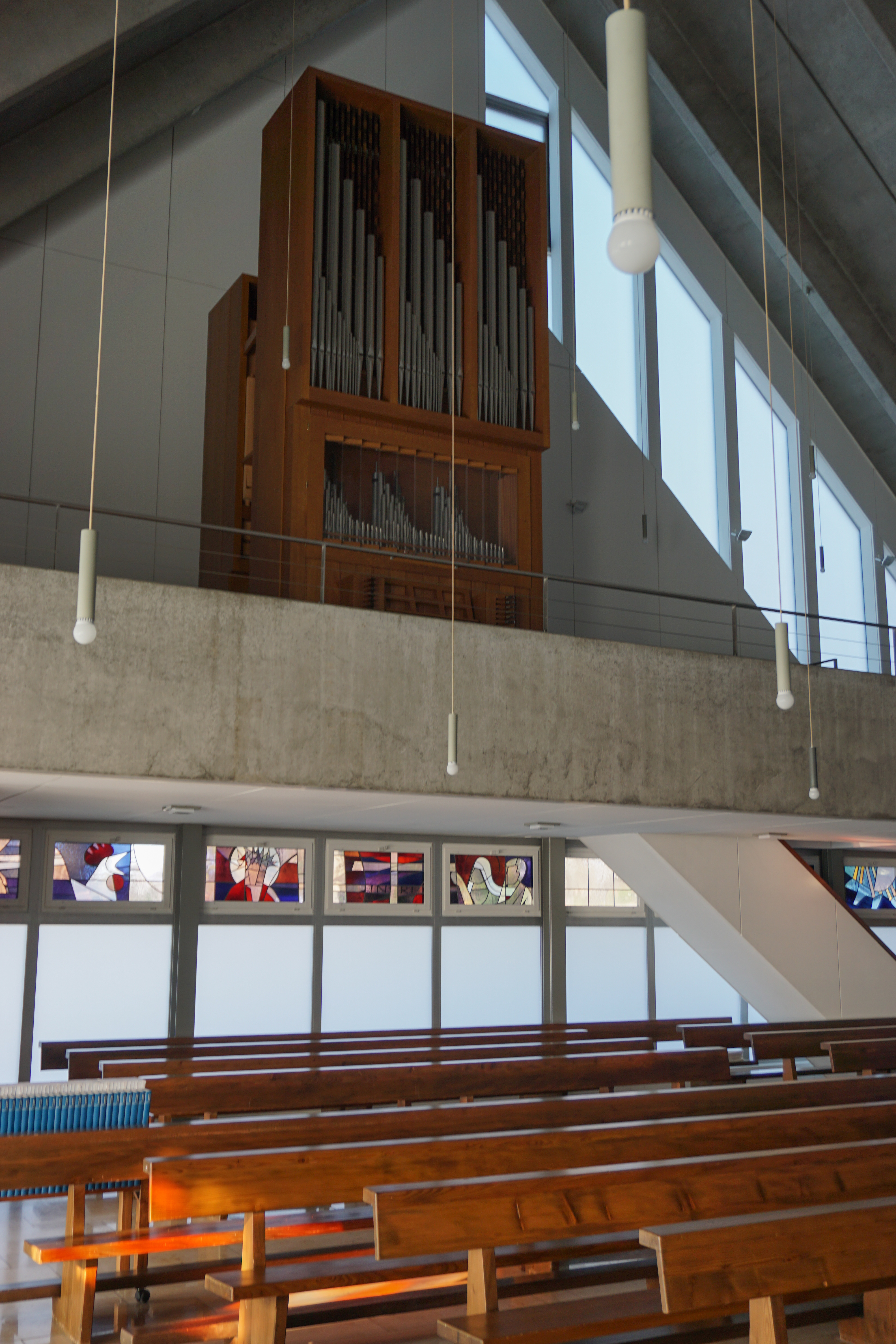 Johanneskirche Orgelempore